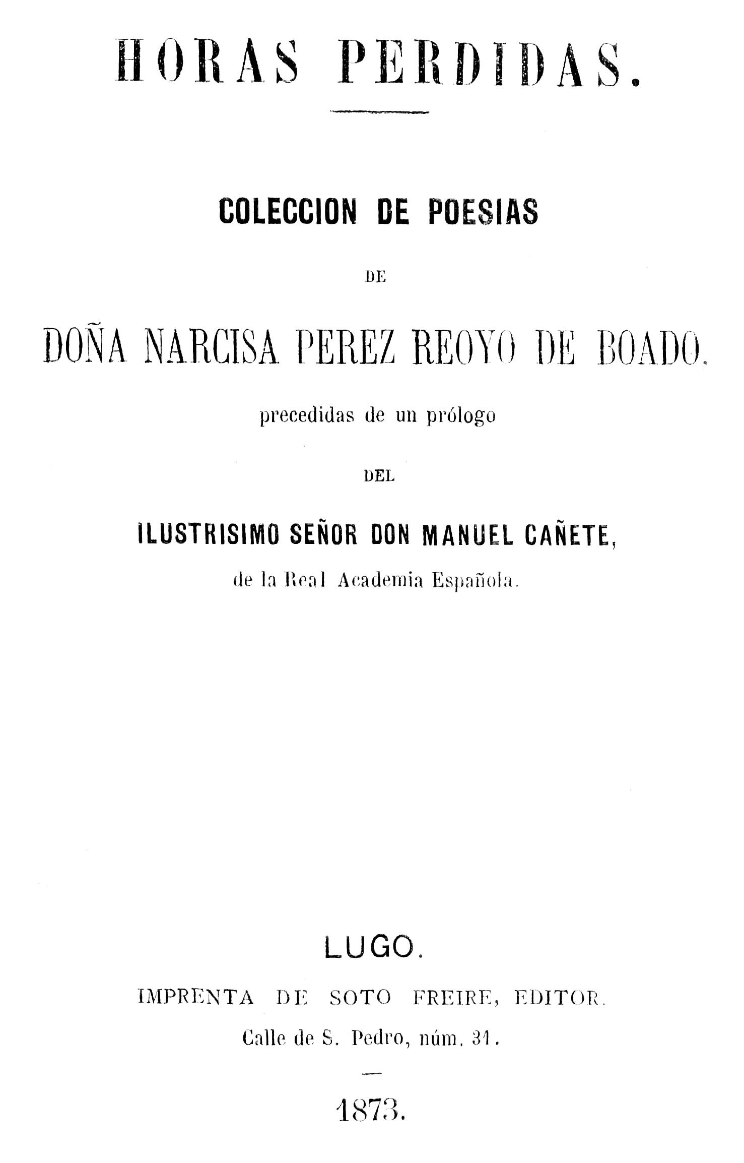 Horas perdidas